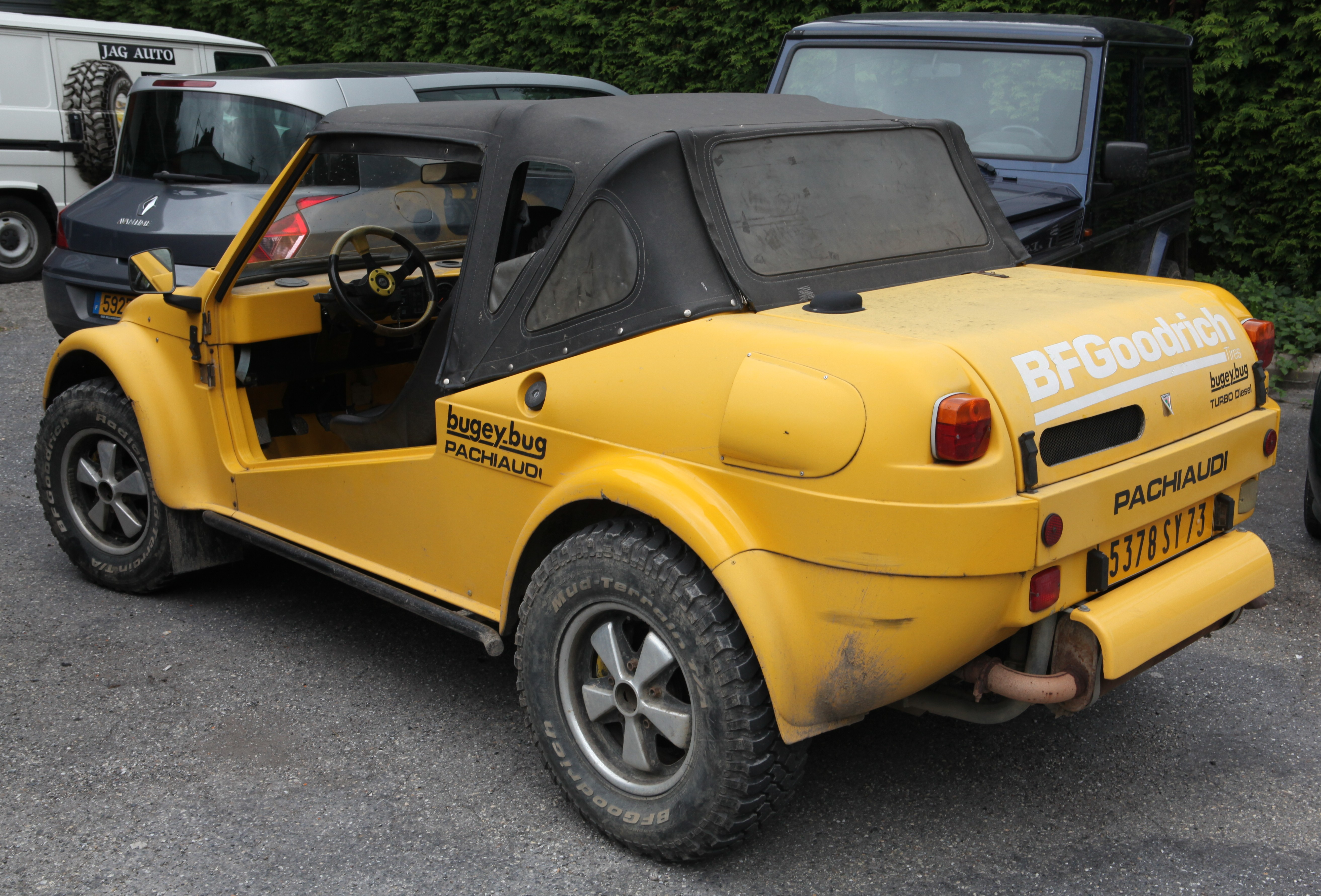 Pachiaudi Bugey Bug